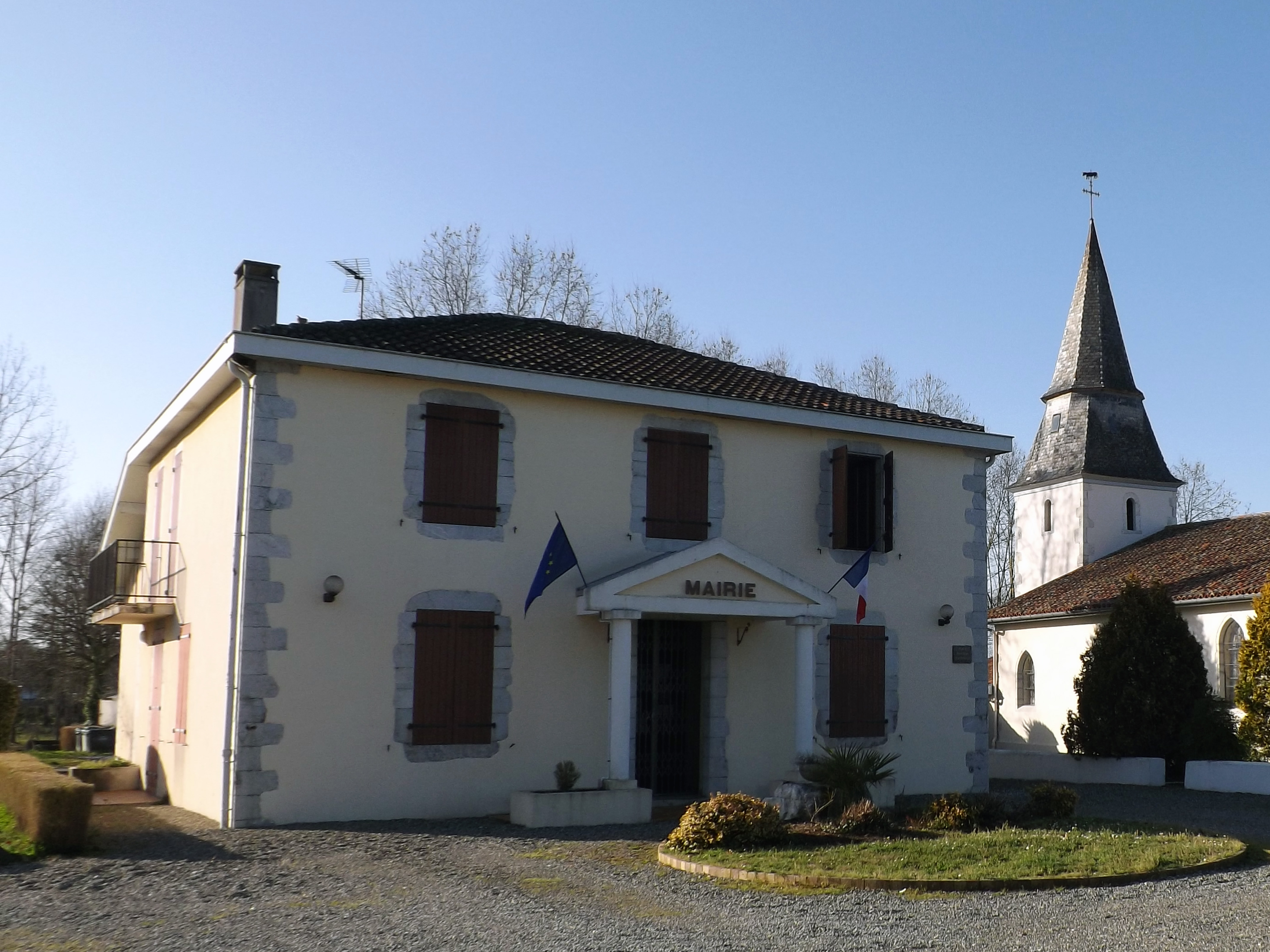 Mairetat d'Arsague, Shalòssa, Gasconha